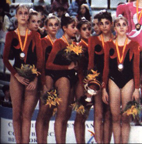 El conjunto español con la plata en el podio de la general del torneo Group Masters de Alicante en 1993. De izquierda a derecha: María Álvarez, Maider Olleta , Regina Guati, Paula Cobo, Eva Velasco, Alicia Martín, Cristina Martínez y Lorena Barbadillo.